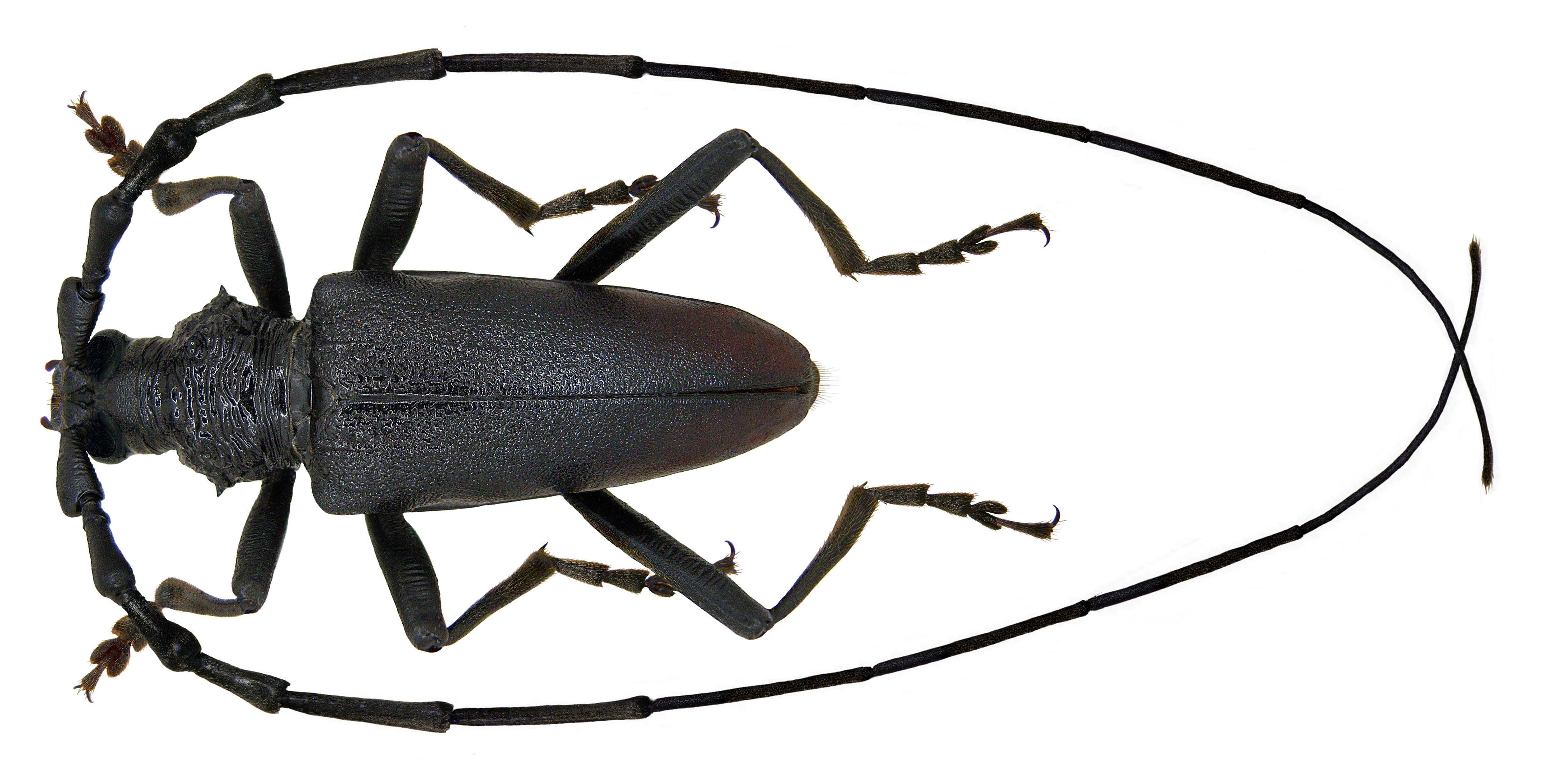 Familie: Cerambycidae Größe: 24-53 mm Verbreitung: Europa Ökologie: Entwicklung in anbrüchigen Eichen Fundort: Korsika, Ghisonaccia leg.det. U.Schmidt, 1973 Foto: U.Schmidt, 2006